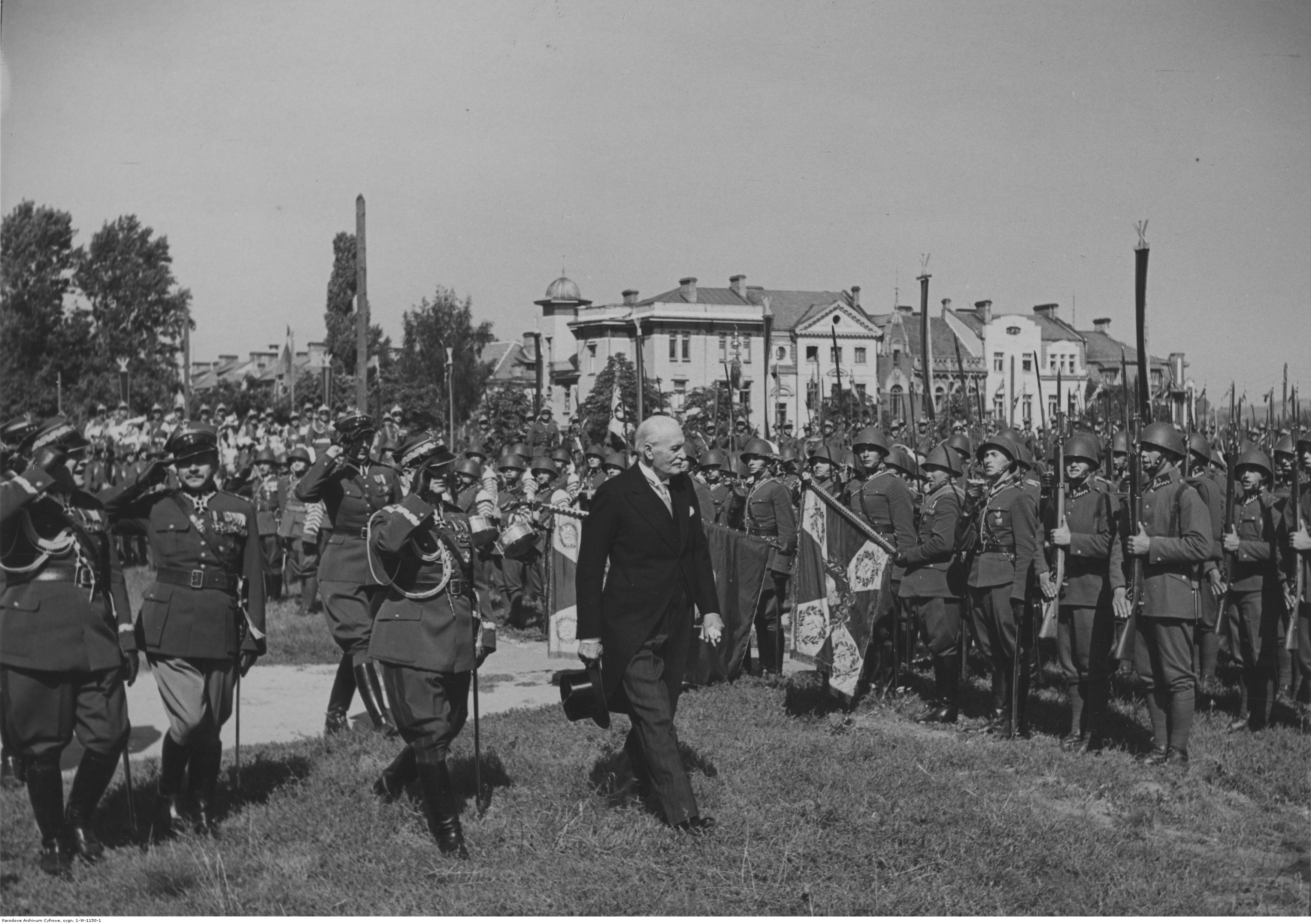 Jubileusz dwudziestopięciolecia 1. Dywizji Piechoty Legionów w Wilnie; sierpień 1939. Fragment uroczystości. Prezydent RP Ignacy Mościcki przechodzi przed pocztami sztandarowymi zgromadzonymi na placu Łukiskim. Z tyłu widoczne domy Montwiłłowskiej Kolonii Mieszkaniowej. Koncern Ilustrowany Kurier Codzienny - Archiwum Ilustracji. Sygnatura: 1-W-1150-1